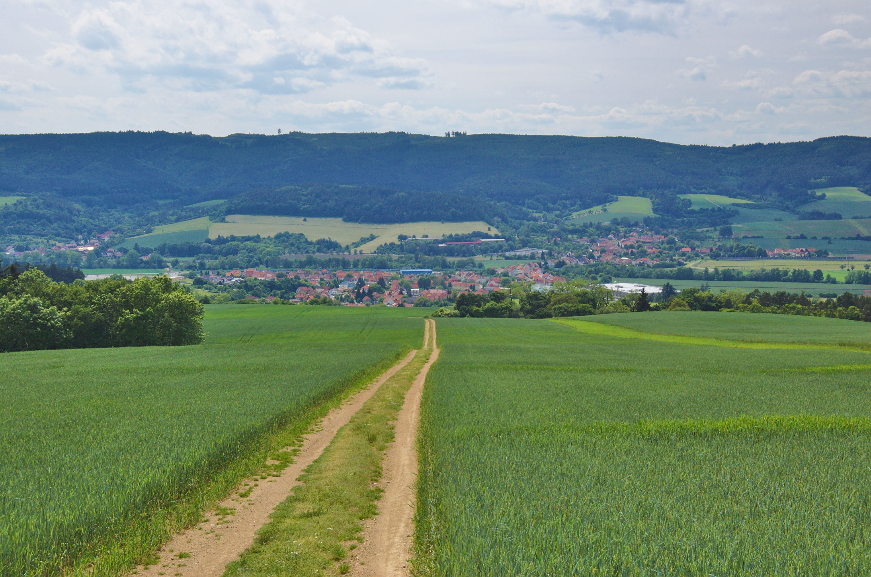 Pohled na Ráječko od východu, okres Blansko